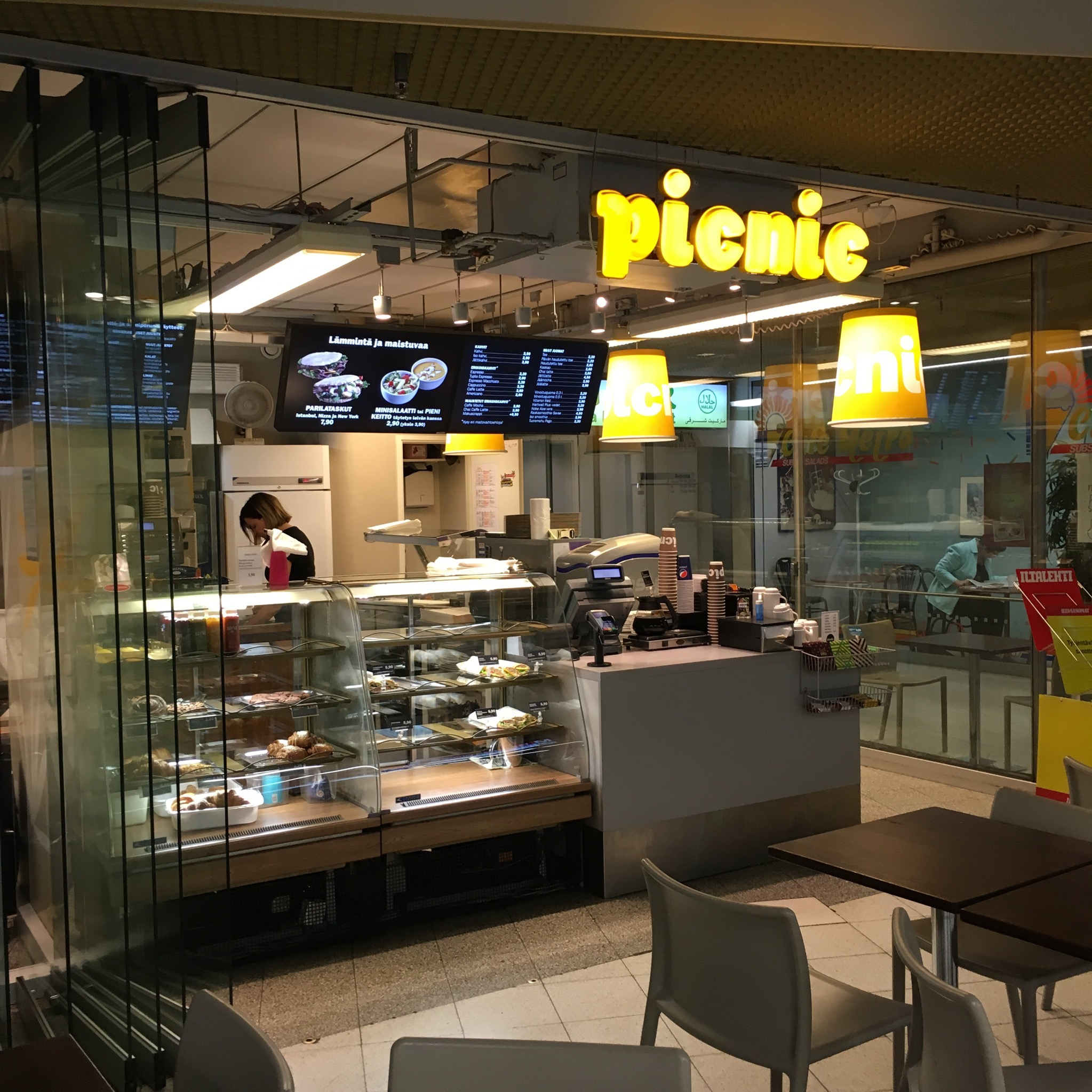 Picnic-kahvila Helsingin Yliopiston metroasemalla Kaisaniemessä